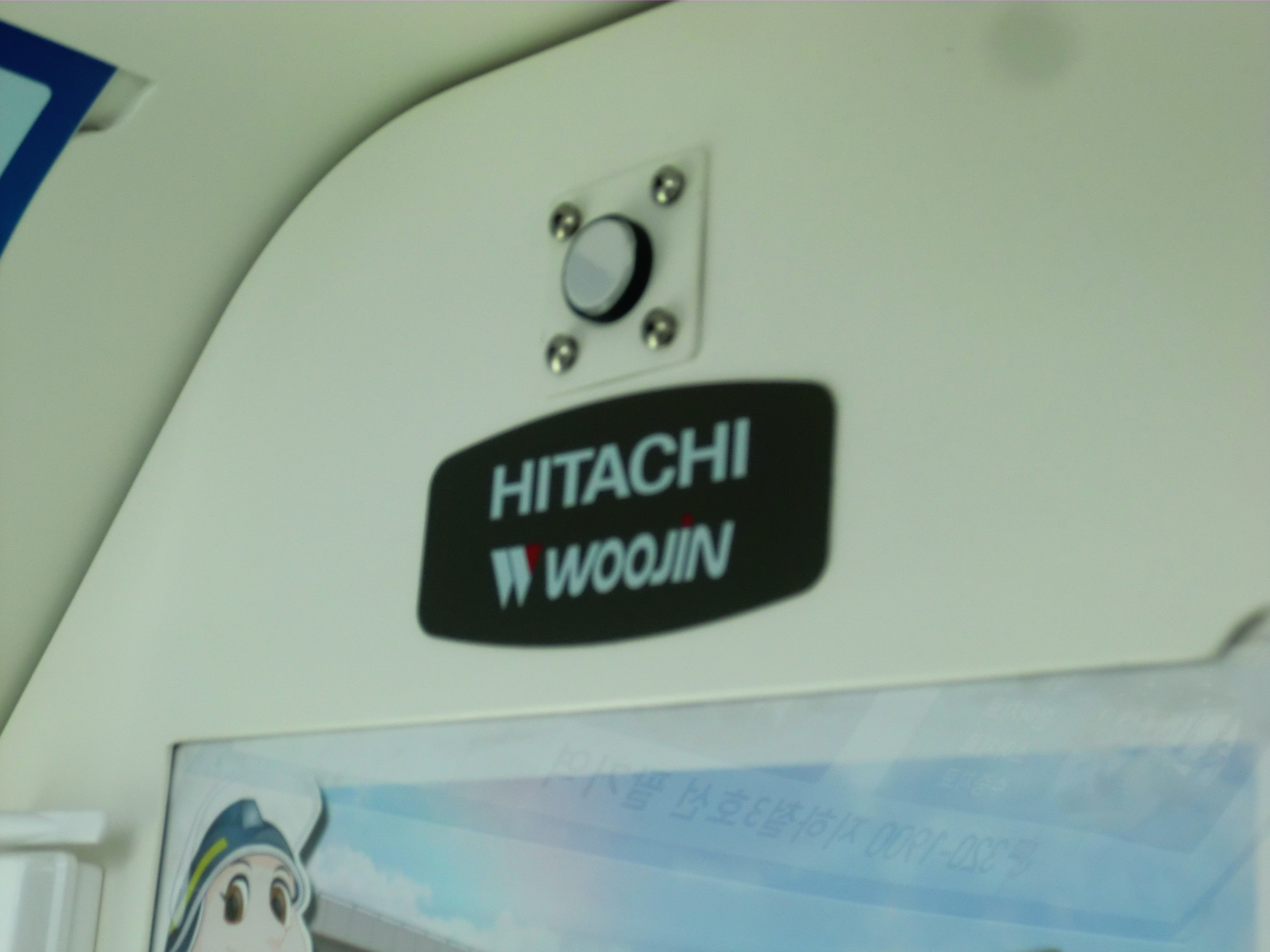 대구도시철도 3000형 제조처명판